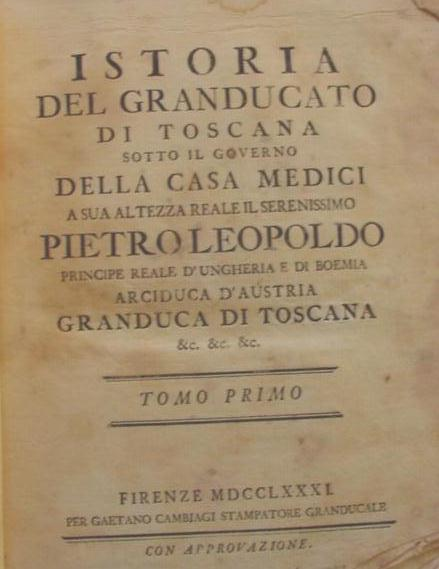 Cover of R. GALLUZZI, Istoria del granducato di Toscana sotto il governo della Casa Medici, Firenze, Cambiagi, 1781